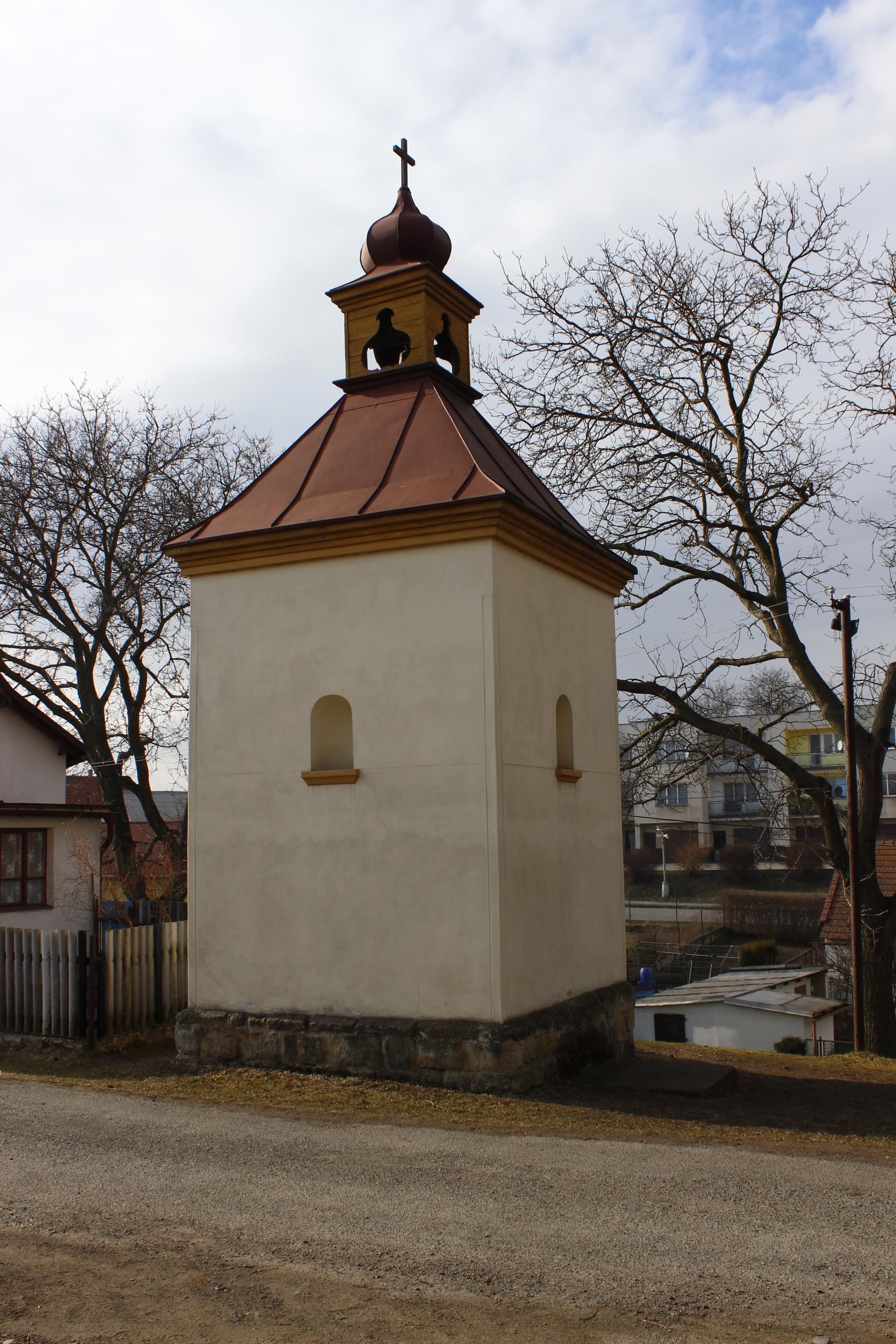 Kaplička v Plužné (pohled od východu).